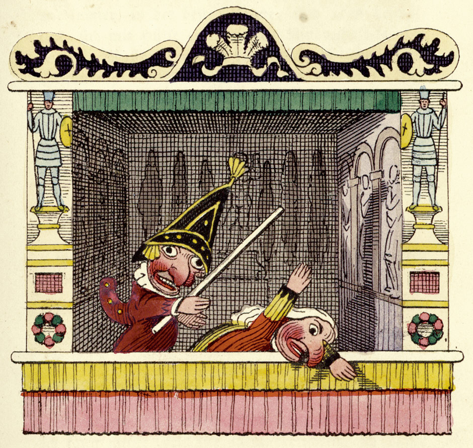 Kasperletheater, aus: Hermann von Pückler-Muskau, Briefe eines Verstorbenen. Ein fragmentarisches Tagebuch aus England, Wales, Irland und Frankreich, geschrieben in den Jahren 1828 und 1829. Stuttgart, Hallberger, 1831.